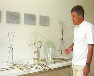 Portrait de Bernard Moninot